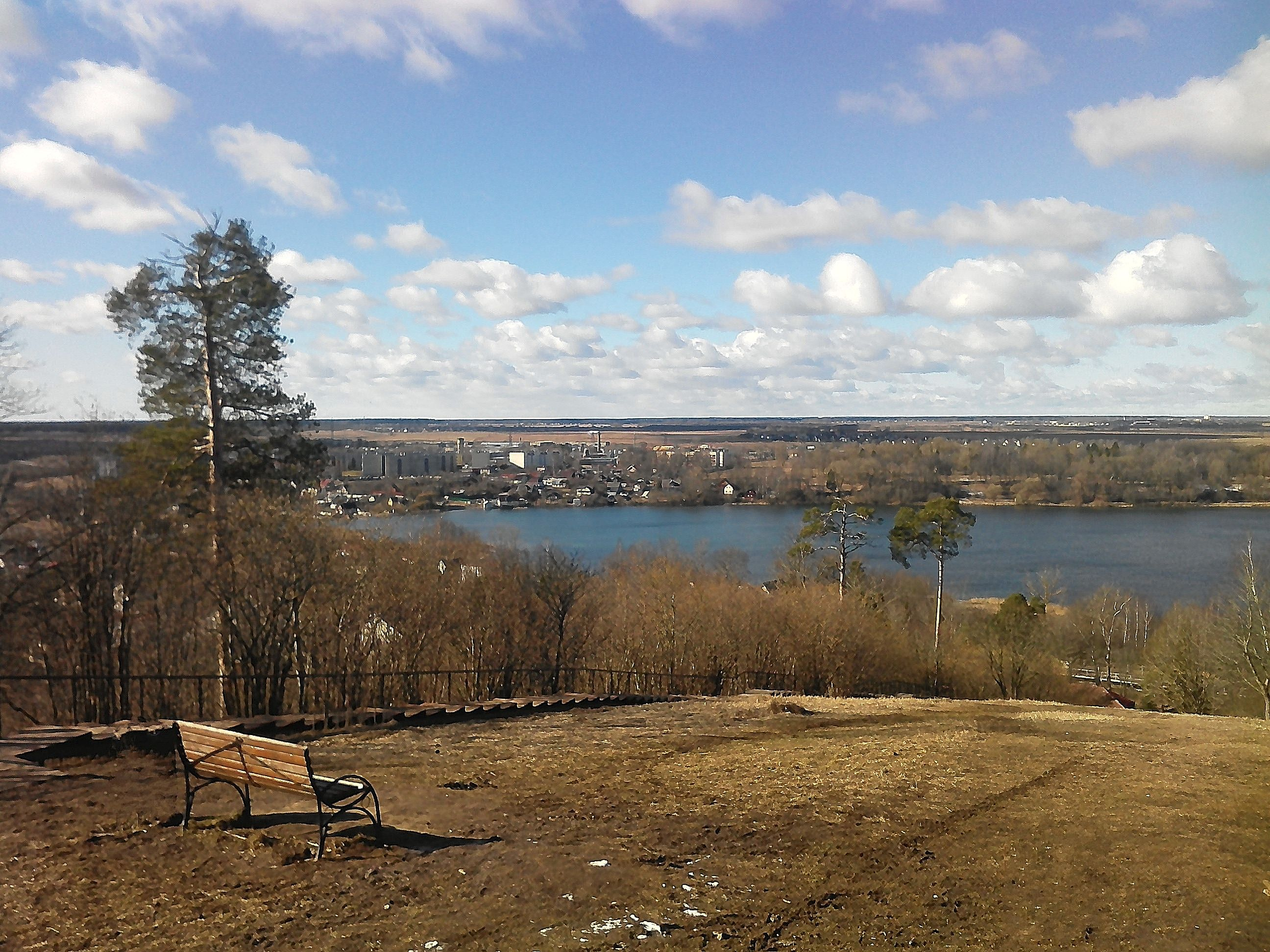 Вид со смотровой площадки Вороньей горы в западном направлении